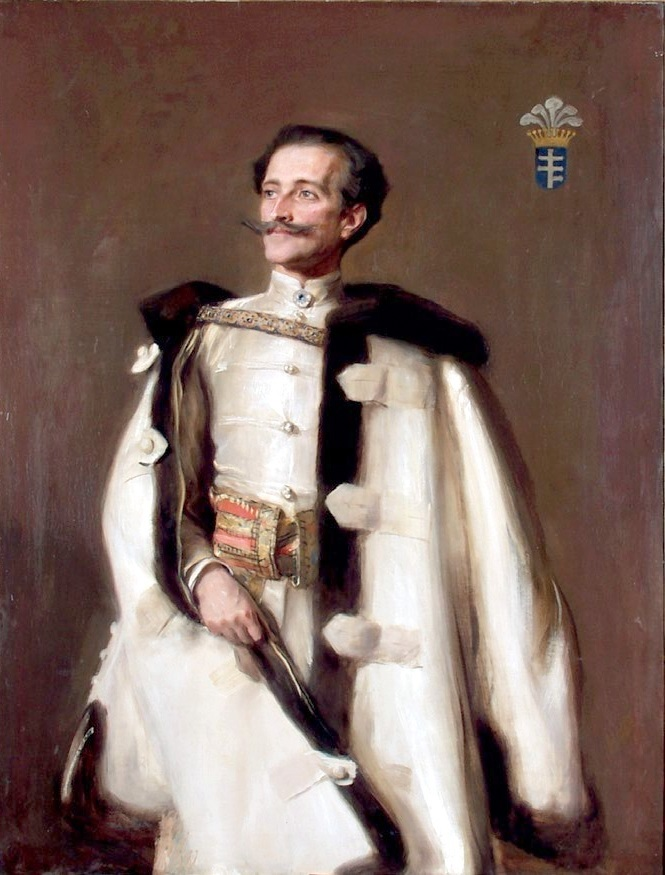 Portret Romana Potockiego